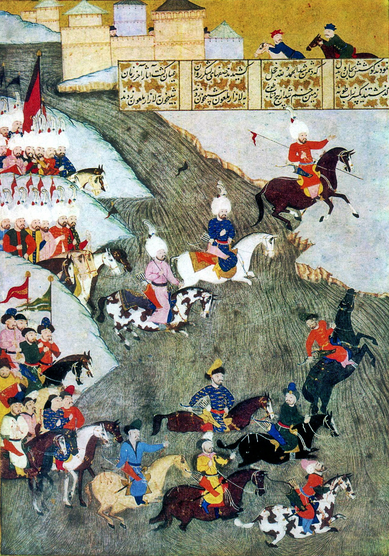 Miniature: Szigetvár campaign 1566, Tatars as avantgarde